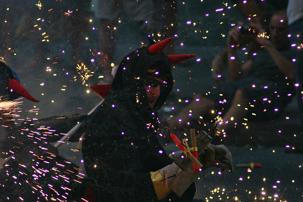 Festes de Gracia 2011